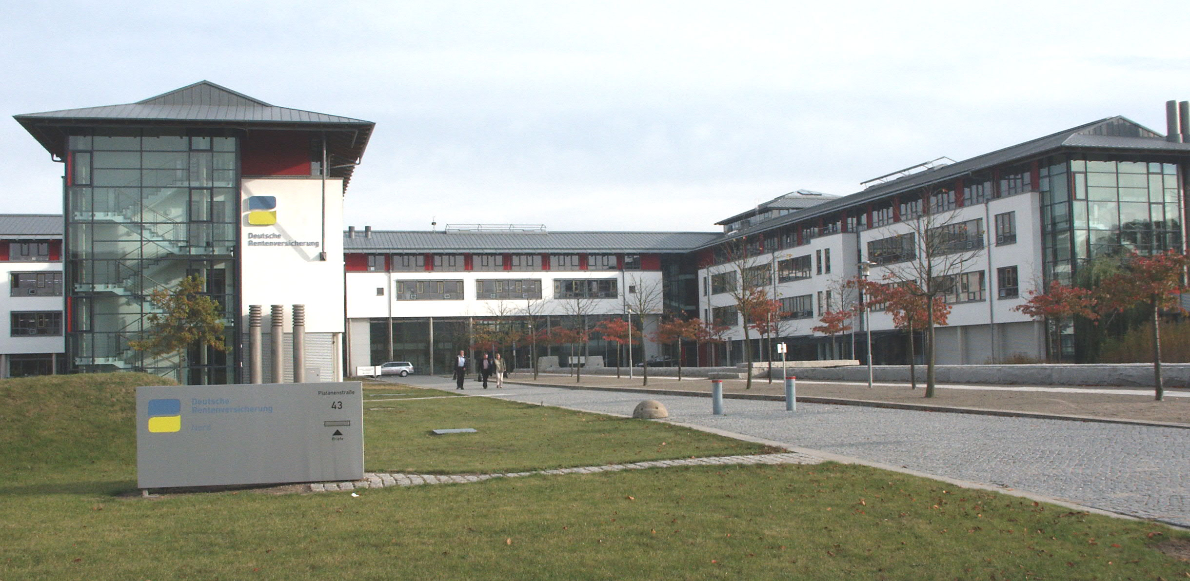 Das Gebäude der DRV Nord am Standort Neubrandenburg, Platanenstr. 43